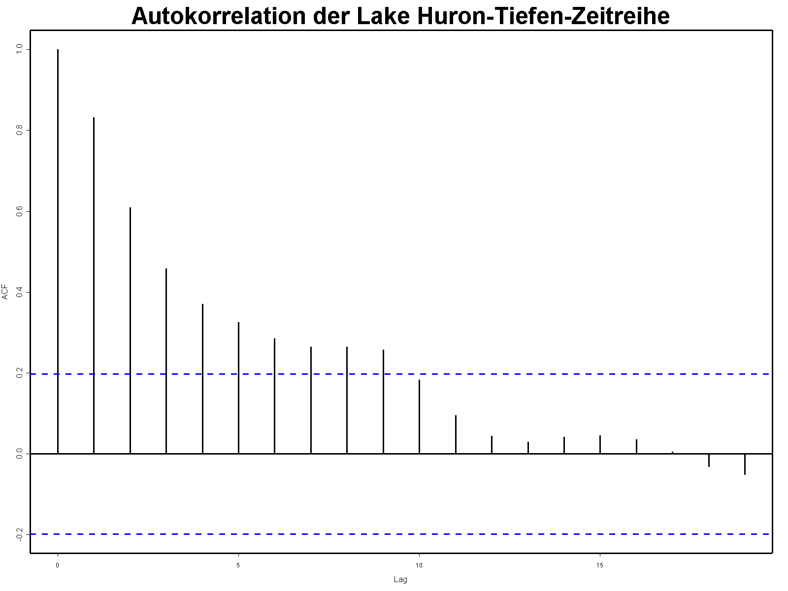 Autokorrelation einer Zeitreihe (Details siehe GNU R-Hilfe: "Annual measurements of the level, in feet, of Lake Huron 1875-1972." R-Quelltext: #LakeHuron ... Level of Lake Huron 1875-1972 png(filename = "Autokorrelation.png", width=1600, height=1200) par(bg="lightgrey",lwd=3) acf(LakeHuron,main="") title(main="Autokorrelation der Lake Huron-Tiefen-Zeitreihe",cex.main=3) dev.off